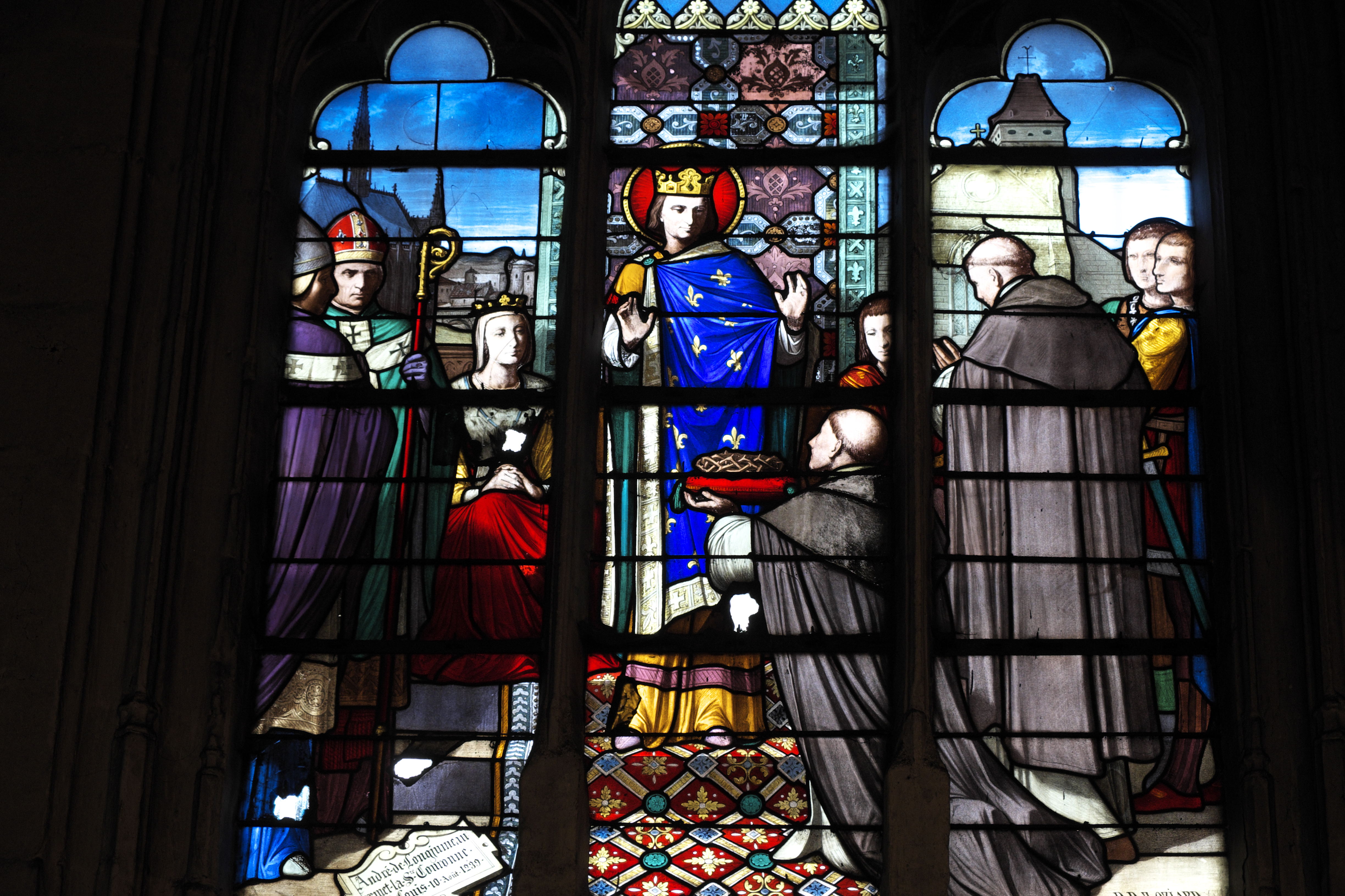 Katholische Pfarrkirche Saint-Martin in Longjumeau im Département Essonne (Île-de-France/Frankreich), Bleiglasfenster mit der Signatur: D.D.J. OZIARD, Darstellung: André de Longjumeau überreicht Ludwig dem Heiligen die Dornenkrone Christi